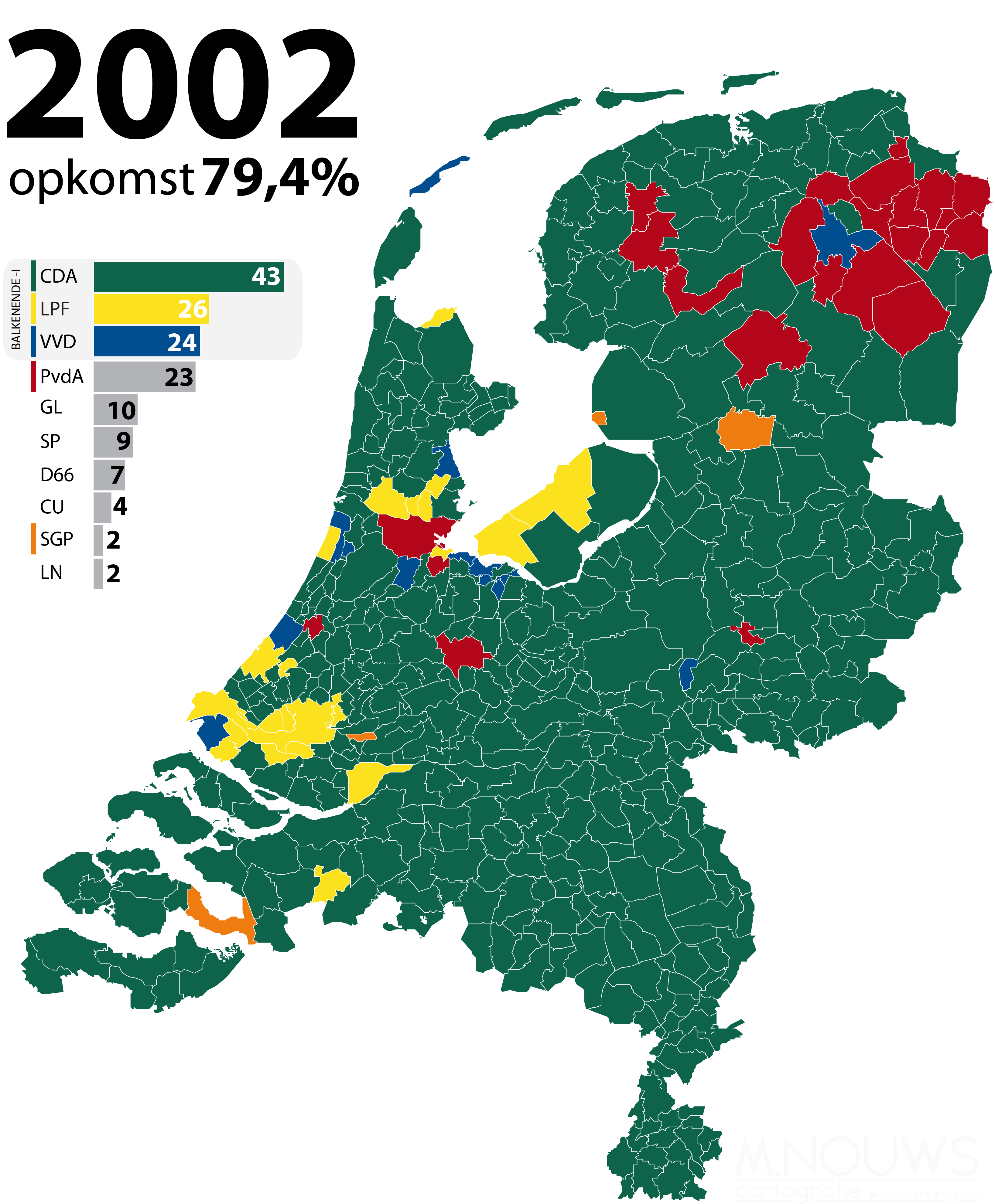 Grootste politieke partij per gemeente, zetelverdeling en kabinetscoalitie bij Tweede Kamerverkiezingen 2002